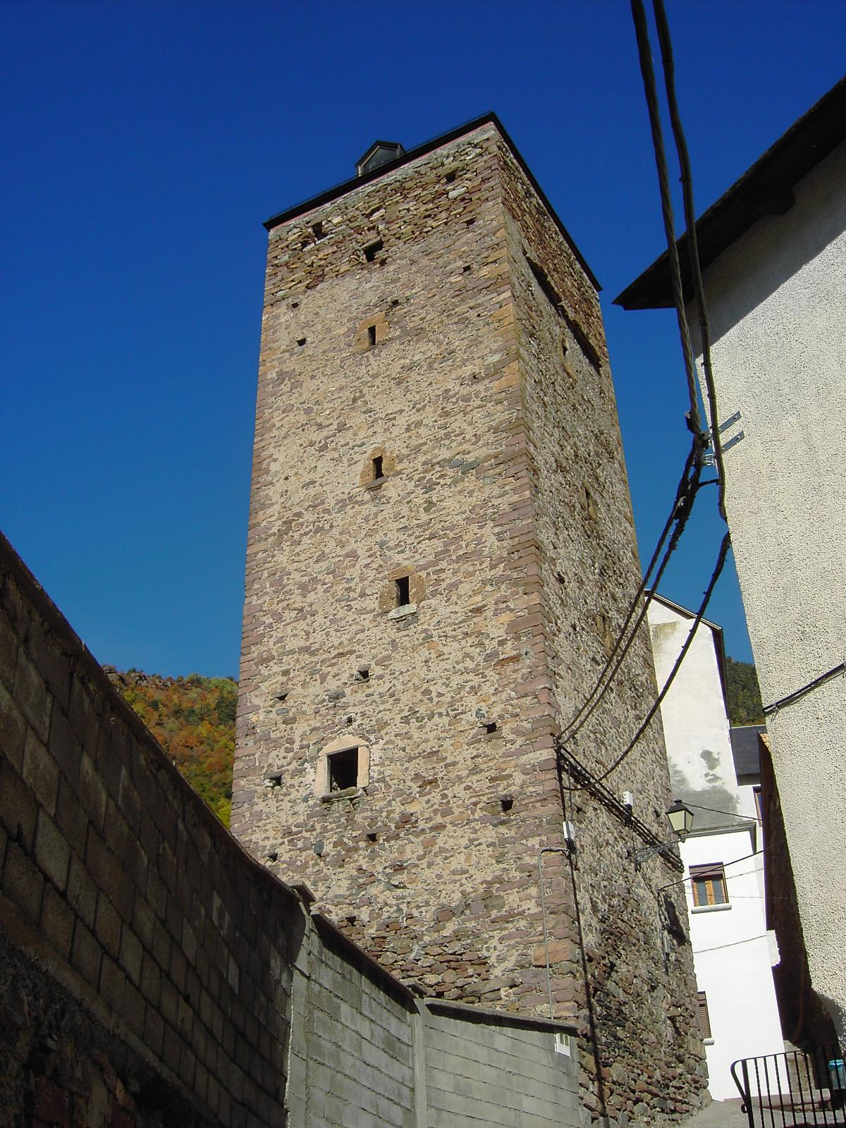 Torre señorial en Chistén, en el valle de Chistau.